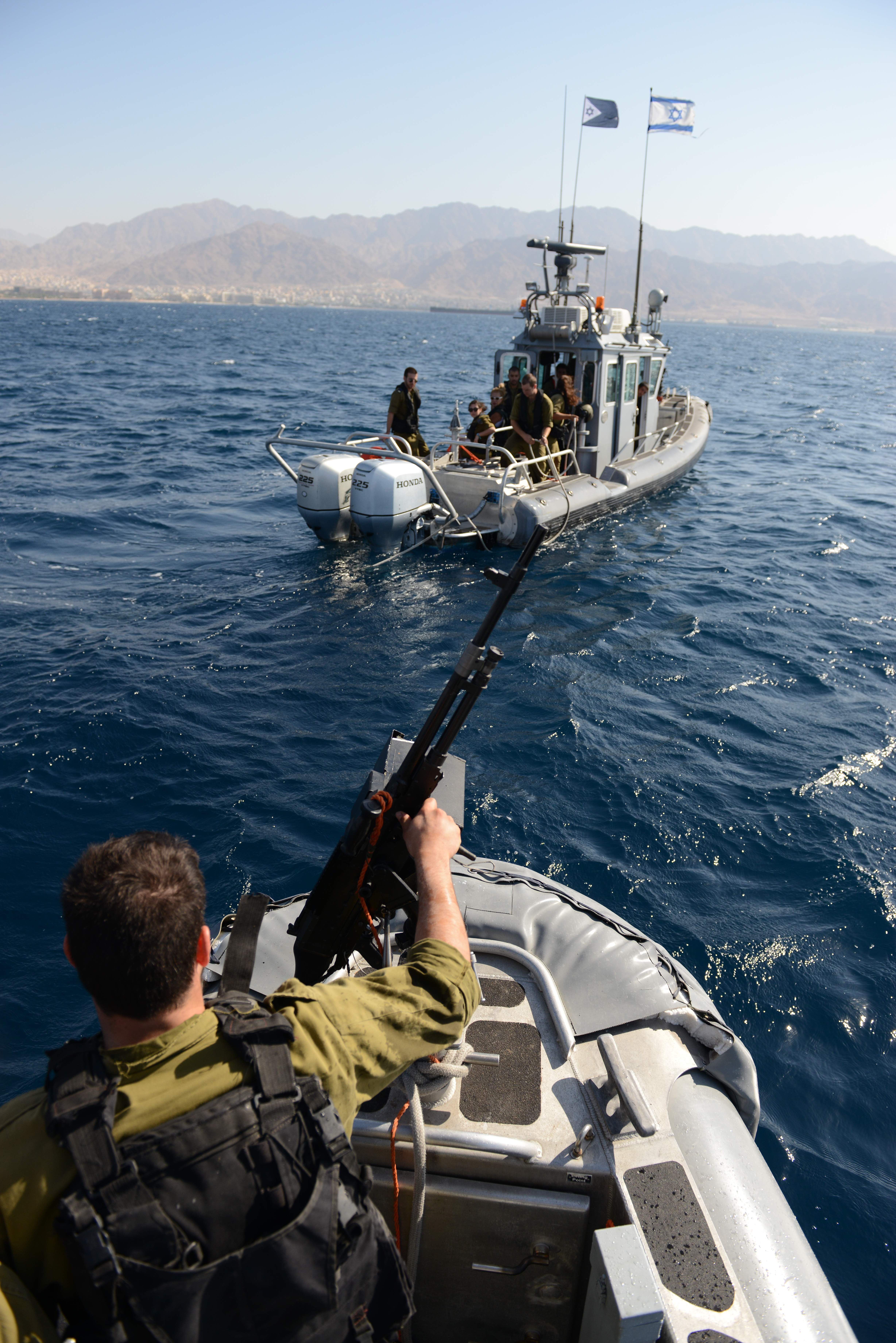 יחידת סנפיר